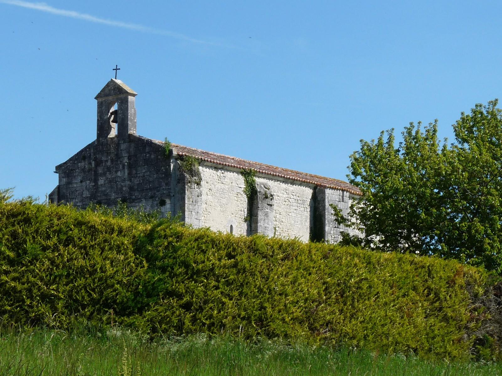 Eglise de Viville, Charente, France